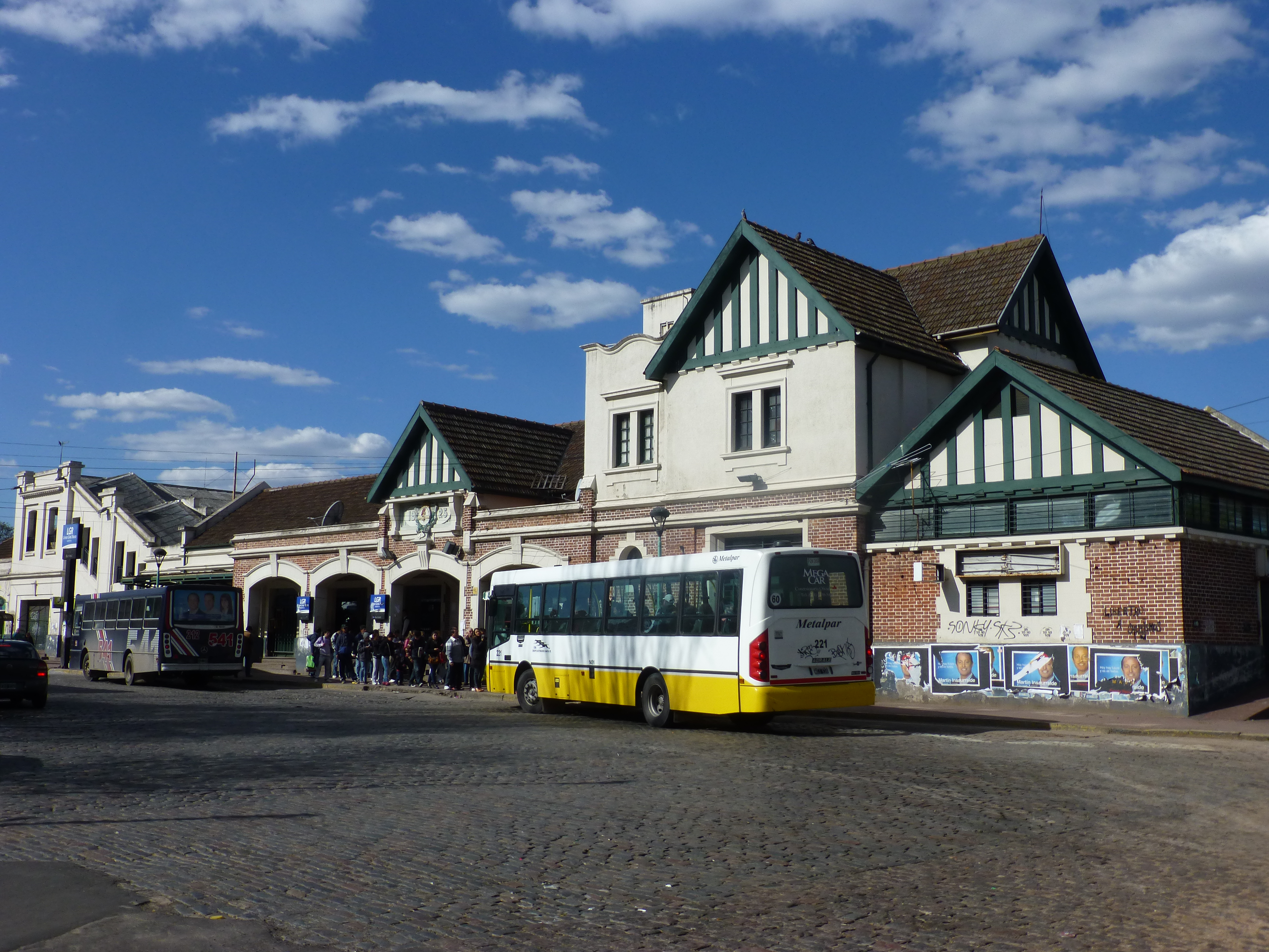 Estación Banfield - Ferrocarril Roca - Buenos Aires